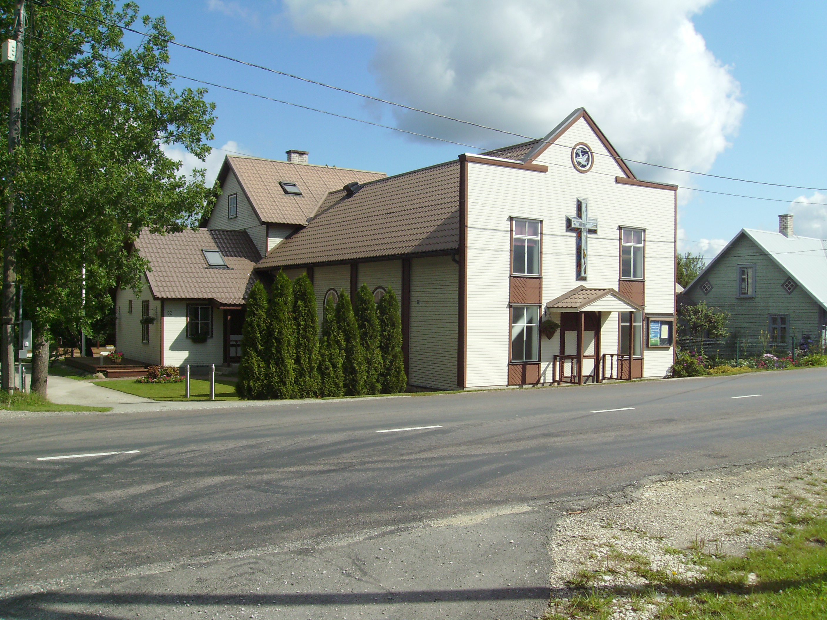 Кохила. Баптистская церковь.